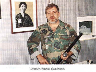 Obrázek velmistra a zakladatele bojového umění Musado.